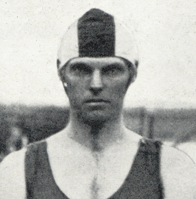 Torsten Kumfeldt